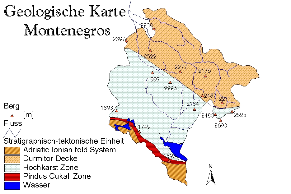 Geologische Zonen in den Südostdinariden (Original text: Für Diplomarbeit nach Radulovic & Radulovic gezeichnet)